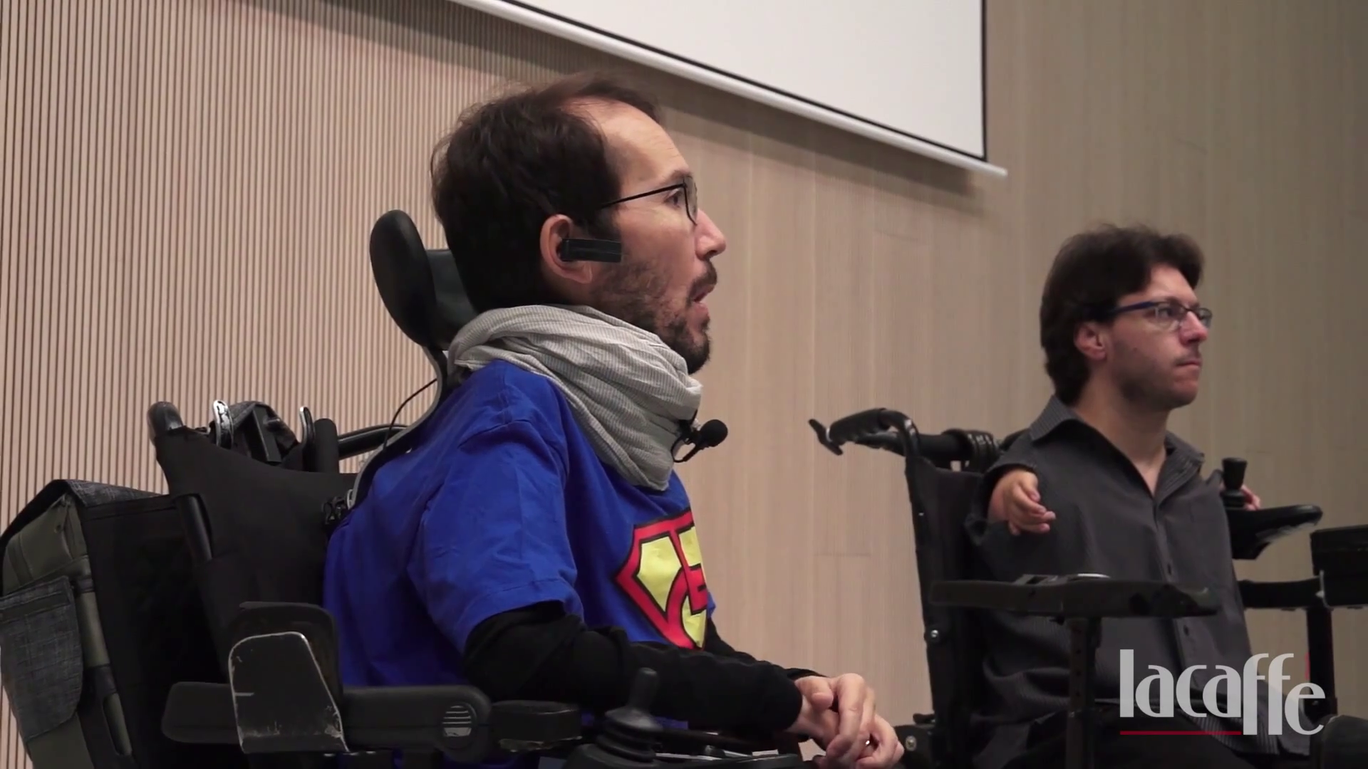 Conferencia de Raúl Gay y Pablo Echenique, del blog De Retrones y Hombres, en Zaragoza